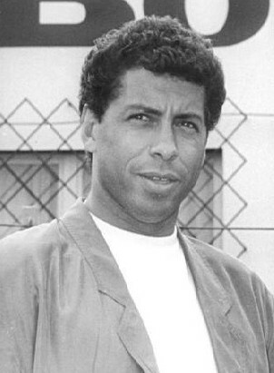 Title: Chemie Böhlen, Trainer Jimmy Hartwig, Achim Steffens People in the image: Hartwig, Jimmy: Fußballspieler, Fußballtrainer, Bundesrepublik Deutschland (GND 119186152) Factual corrections and alternative descriptions are encouraged separately from the original description. Additionally errors can be reported at this page to inform the Bundesarchiv. Original historic description: ADN-Kluge-5.5.90-Leipzig: Jimmy Hartwig (l) wird der erste Trainer aus der Bundesrepublik in der DDR-Fussball-Oberliga sein. Der 35jährige, der selbst 163 Bundesligaspieler für den Hamburger SV und Köln sowie 14 Länderspiele bestritt, unterschrieb für die kommende Saison einen Vertrag beim Aufsteiger Chemie Böhlen. Der bisherige Trainer Achim Steffens (r) wird ihm assistieren.